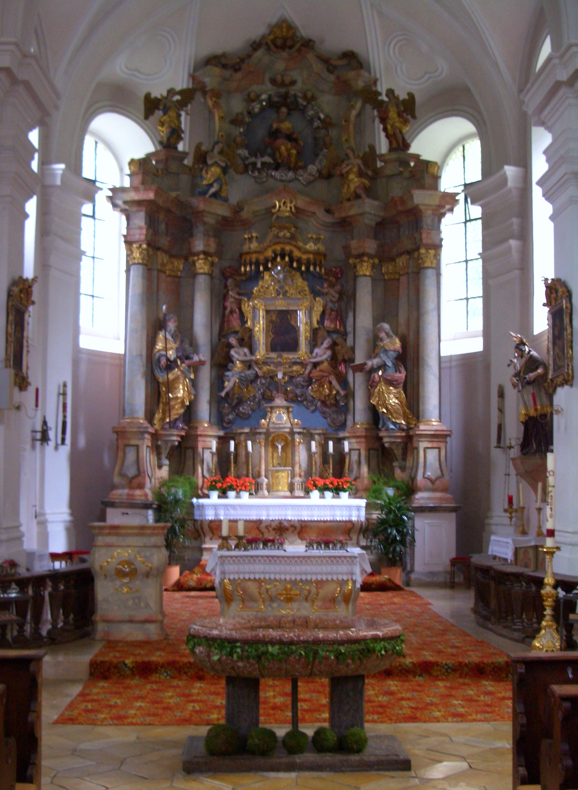 Altar und Brunnen in der Wallfahrtskirche Heilbruennl in Roding